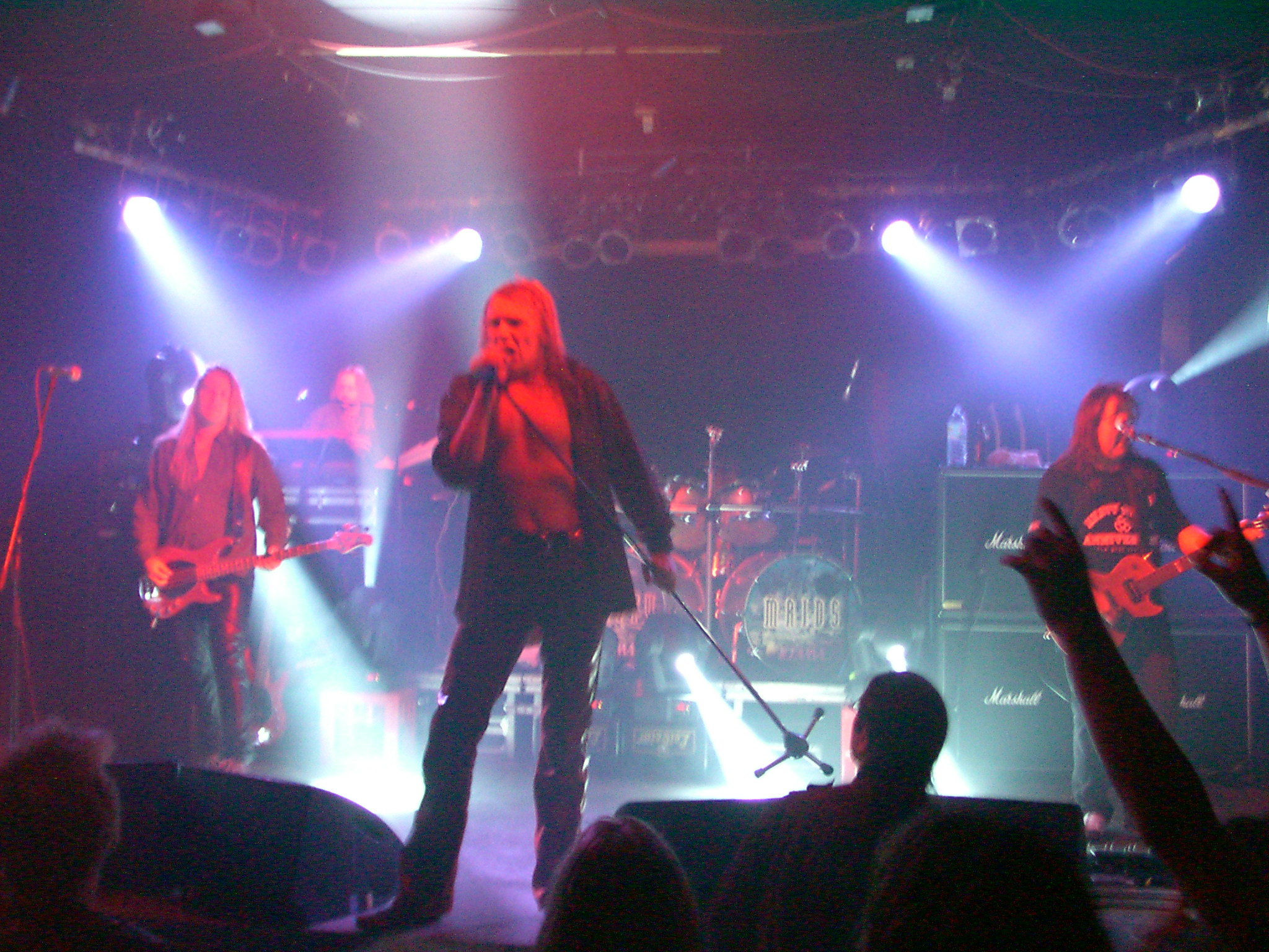 Pretty Maids, Live in Nürnberg, Hirsch, am 16.04.2002